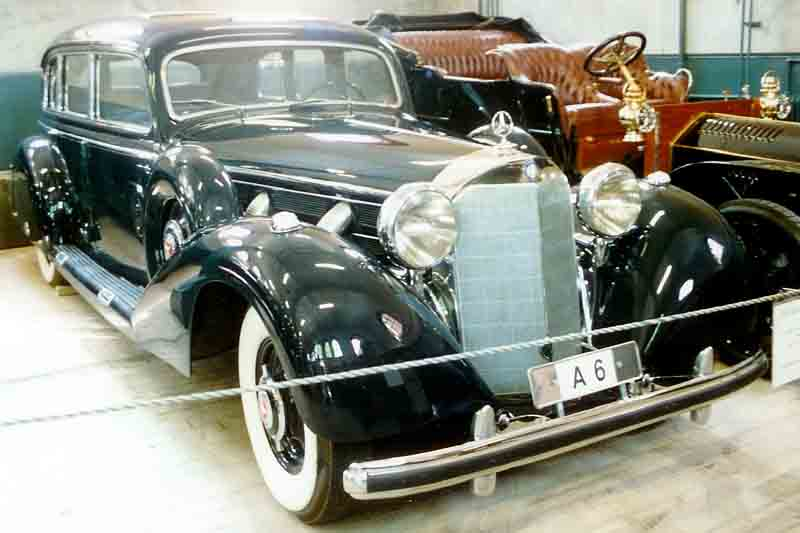 Mercedes-Benz 770 Pullman-Limousine